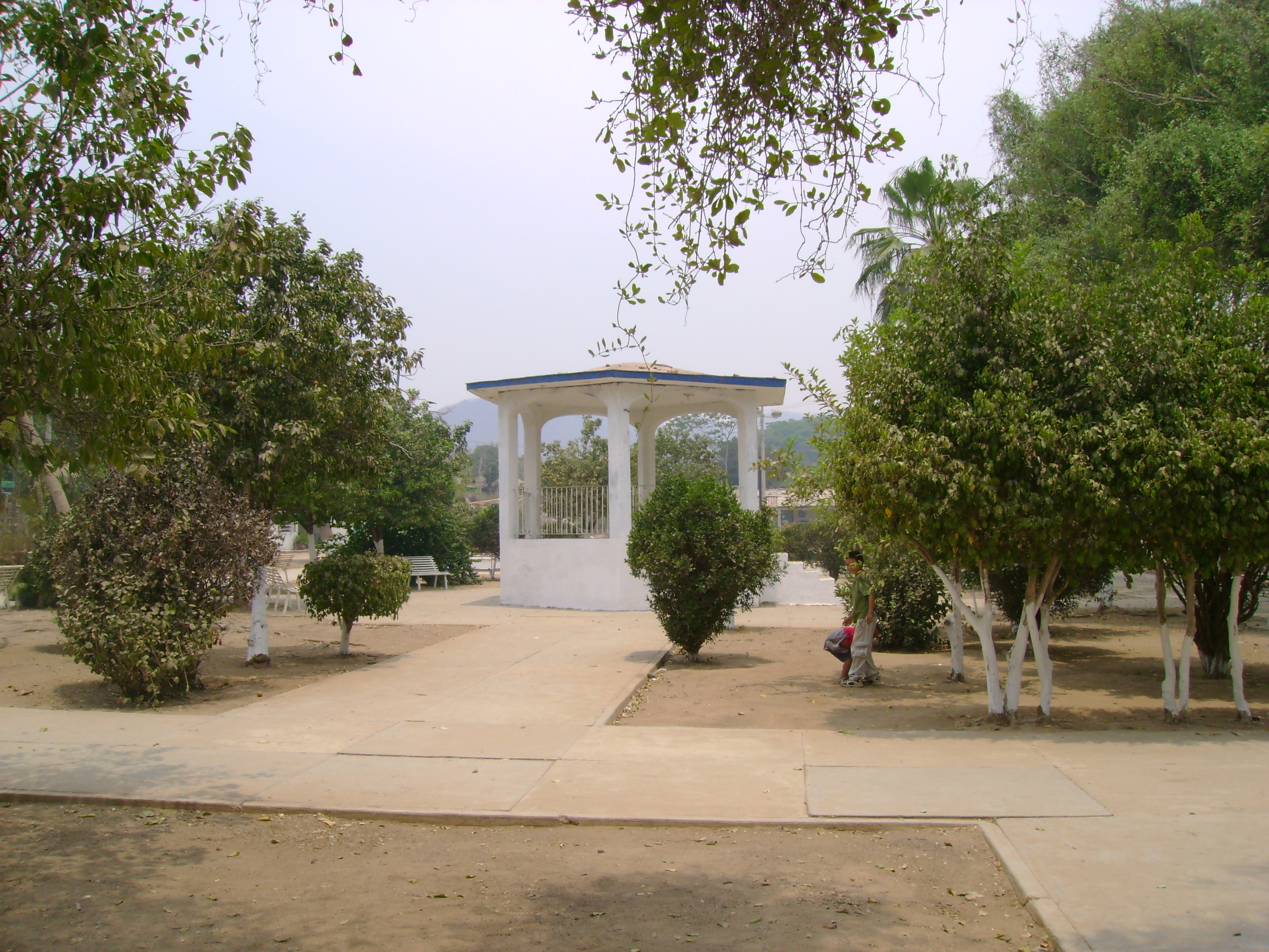 El Centro parque del poblado de La Central — en el municipio de Manzanillo, Colima, Mexico.